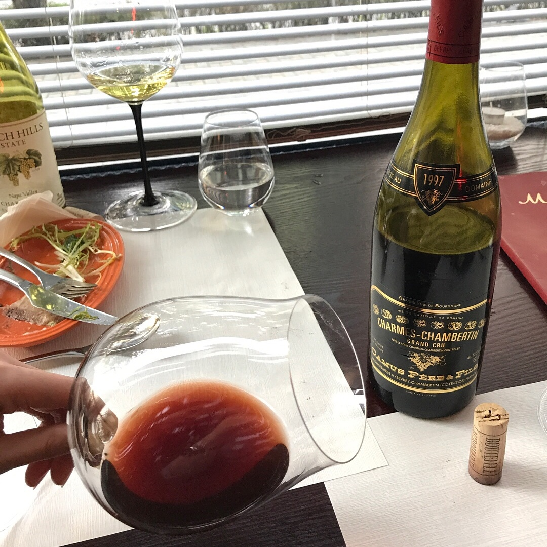 올드빈티지